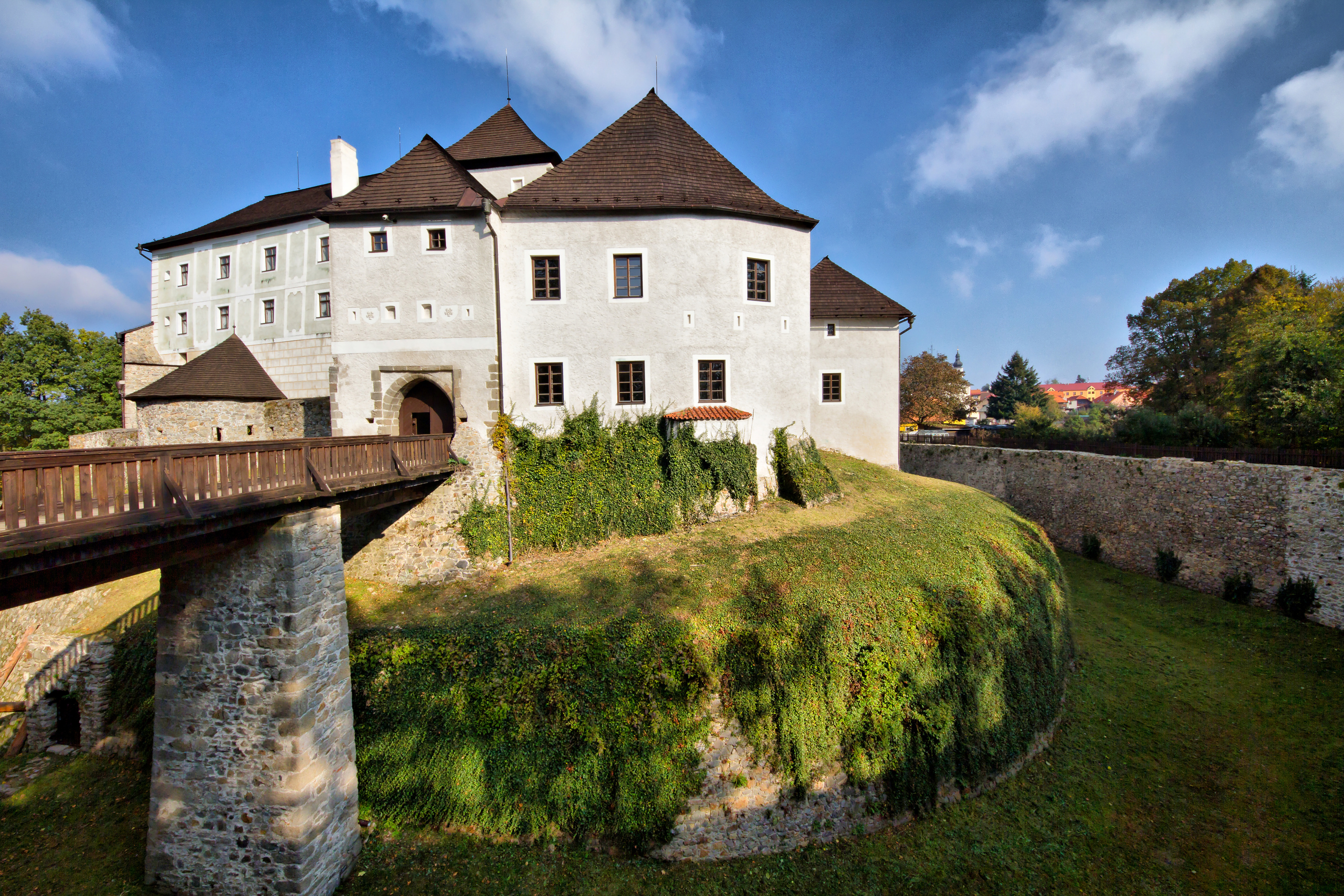 Starý zámek Nové Hrady, Nové Hrady 33, Nové Hrady.